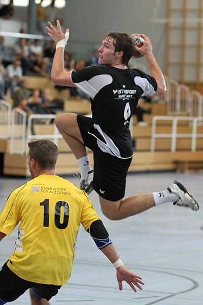 Cornelius Maas hat das gegnerische Tor im Visier.